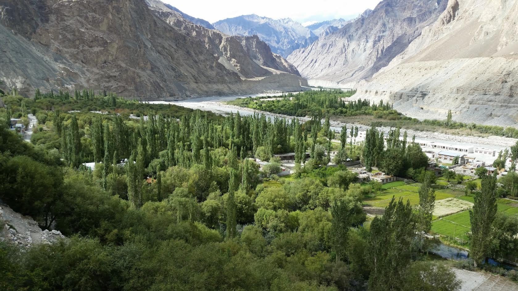 Turtuk, Ladakh, Indien